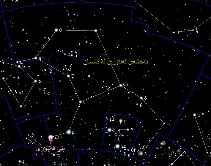 کوردی: شوێنی ئالفا قەنتۆری لە ئاسمانی زەویدا